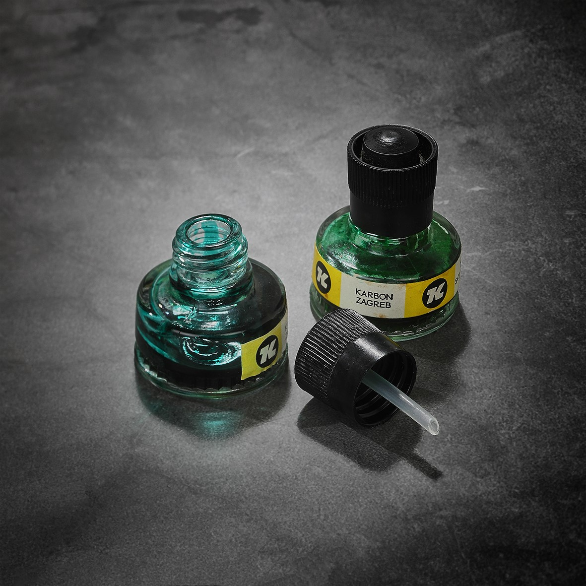 Karbon - slikarski tuš u staklenoj bočici s plastičnim čepom koji ima gumenu pumpicu i plastično pero, 1980-te godine